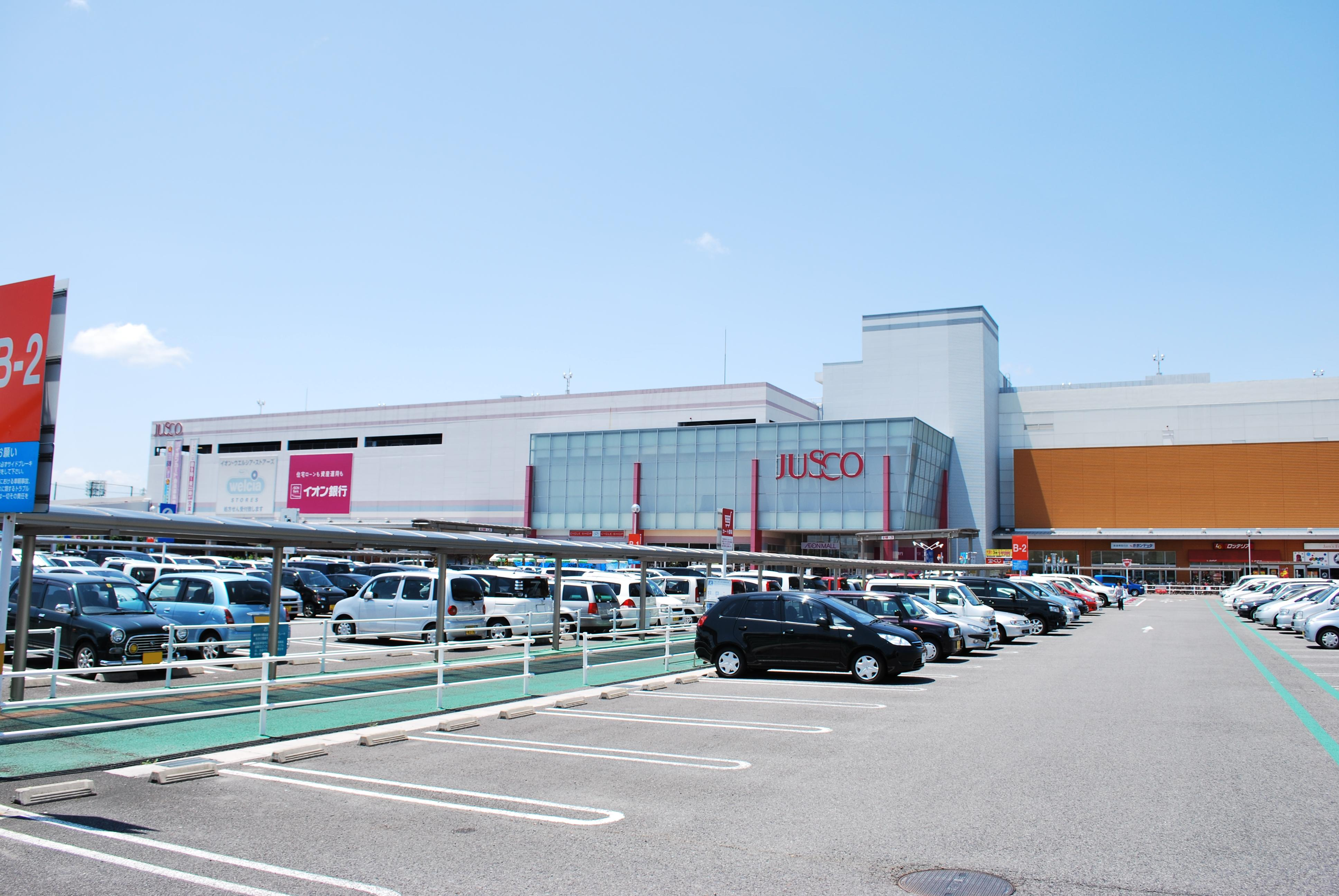 イオンモール木曽川キリオ（ジャスコ棟）。